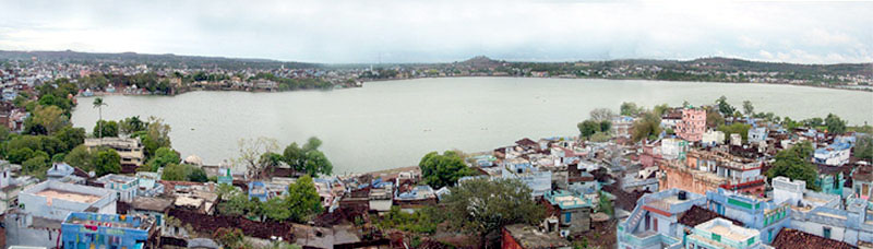 सागर झील (लाखा बंजारा झील)का मनोरम दृश्‍य